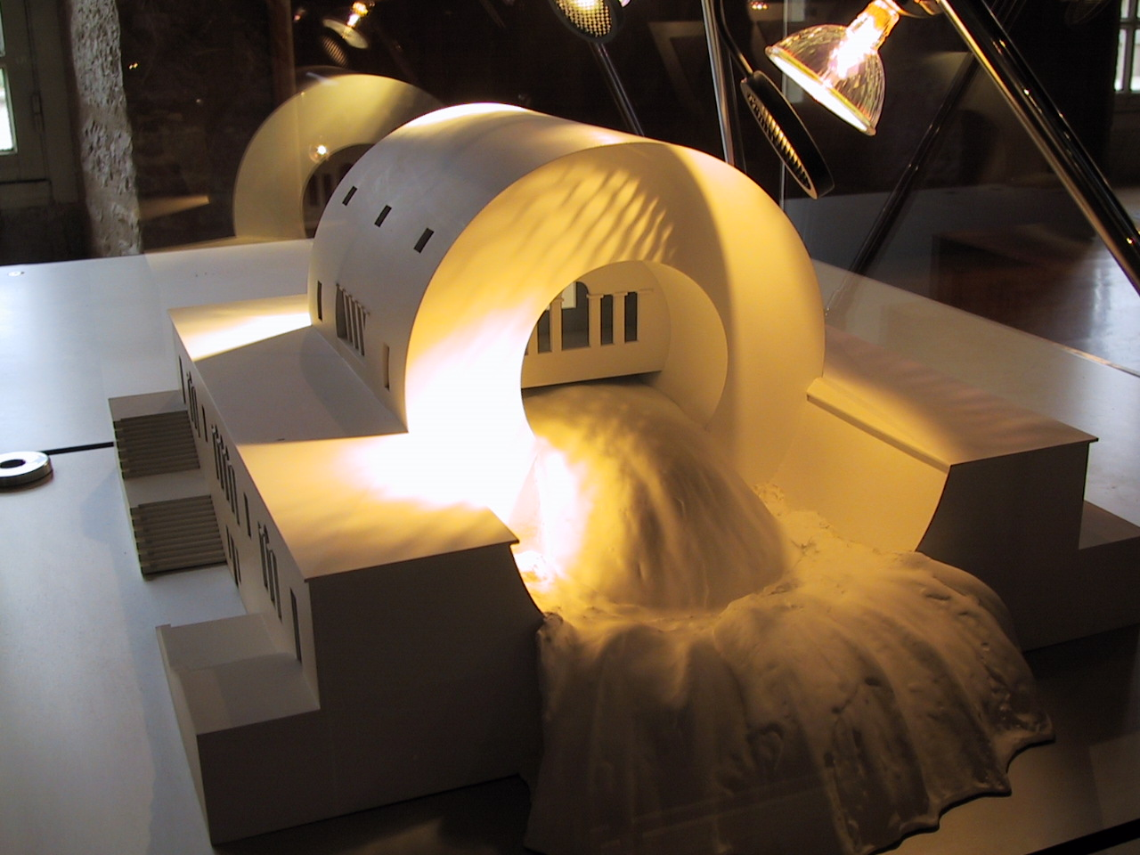 Königliche Saline von Arc-et-Senans (Chaux): Haus des Flußwächters